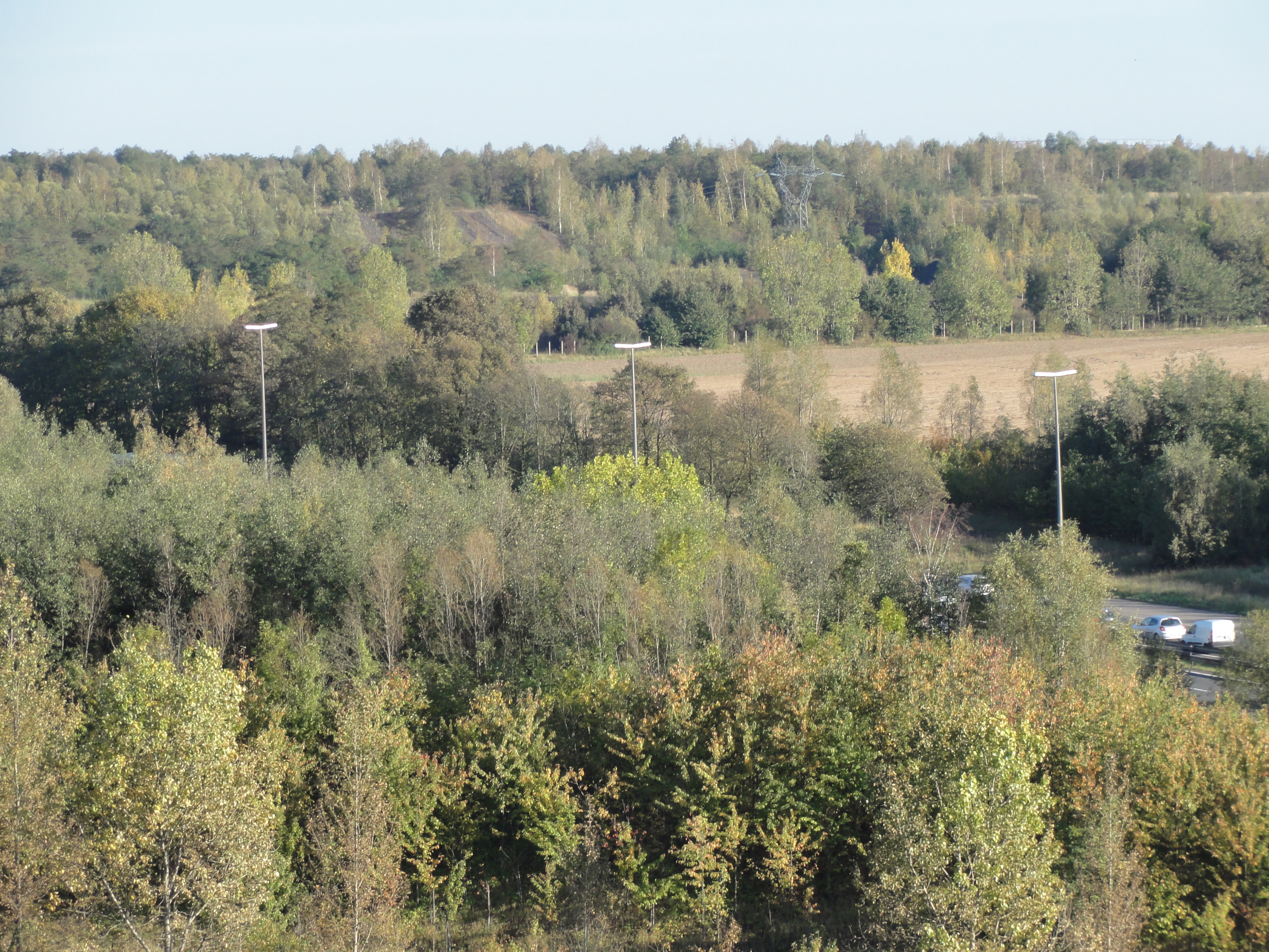 Terril n° 260 dit Lavoir de Fouquières, Lavoir de Fouquières du Groupe d'Hénin-Liétard, Fouquières-lez-Lens, Pas-de-Calais, Nord-Pas-de-Calais, France.